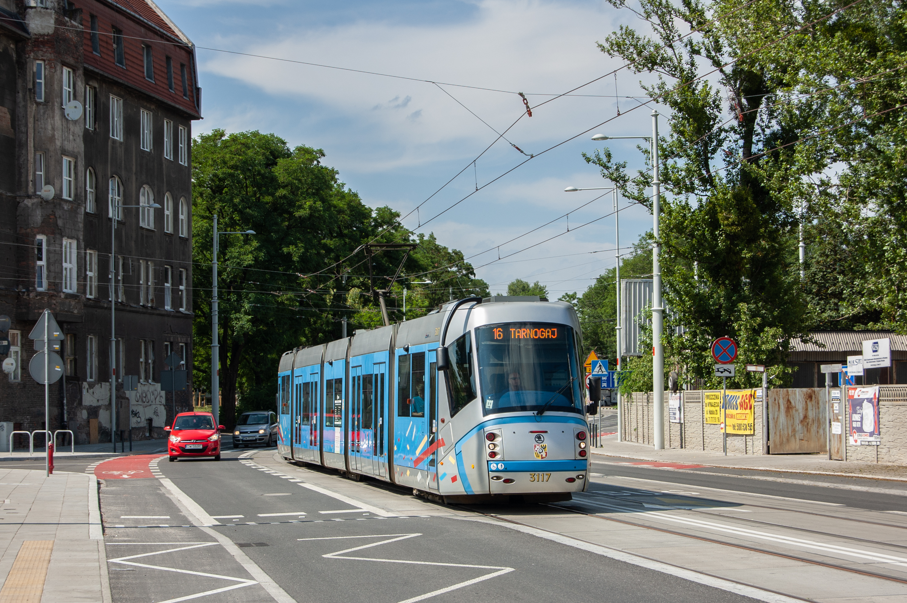 Wrocław, ul. Hubska